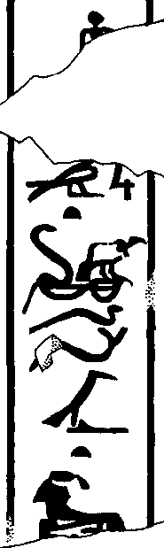 ink inscription of the queen Djefat-Nebti (third egyptian dynasty)